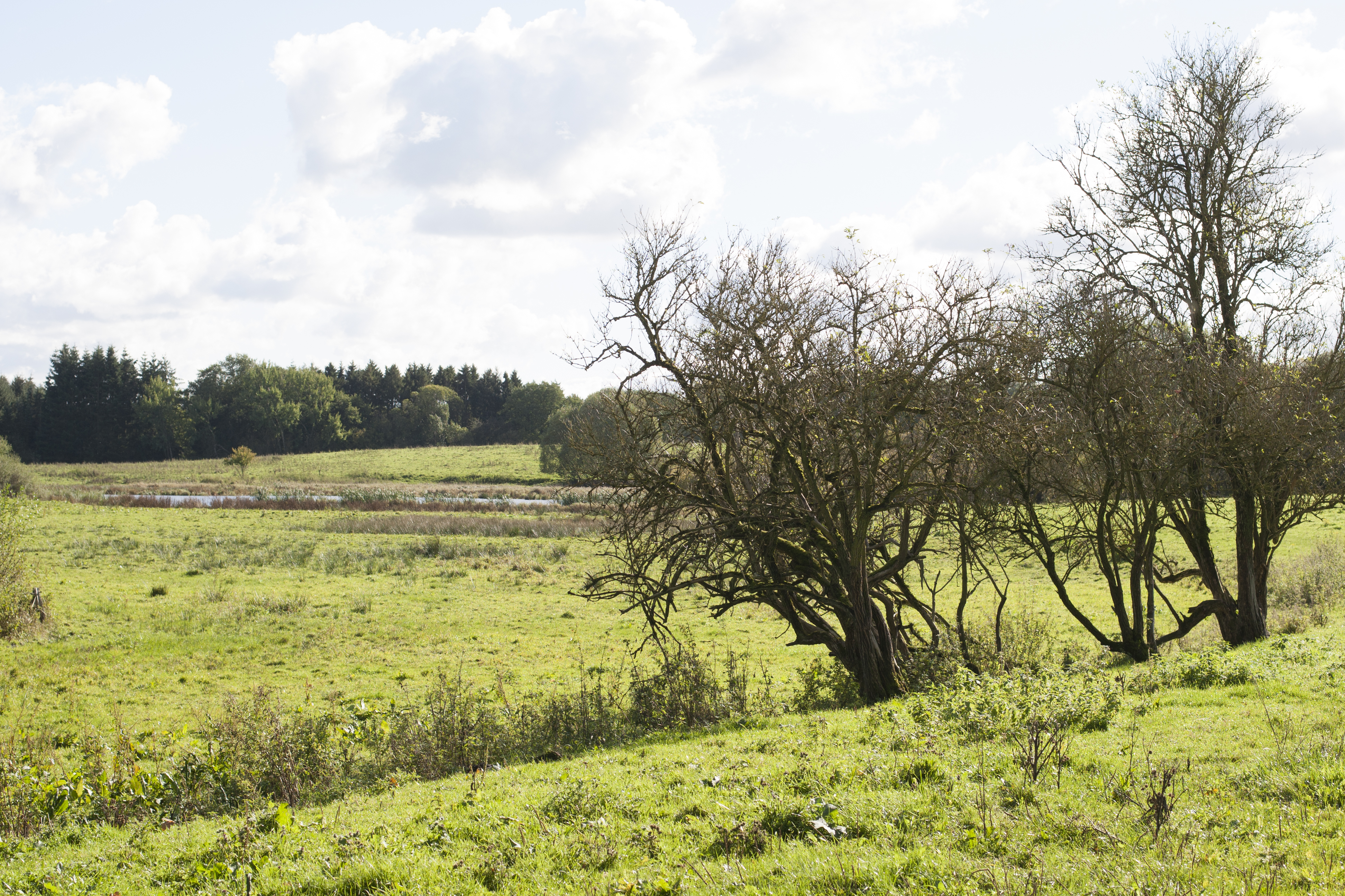 Weideland im Curauer Moor